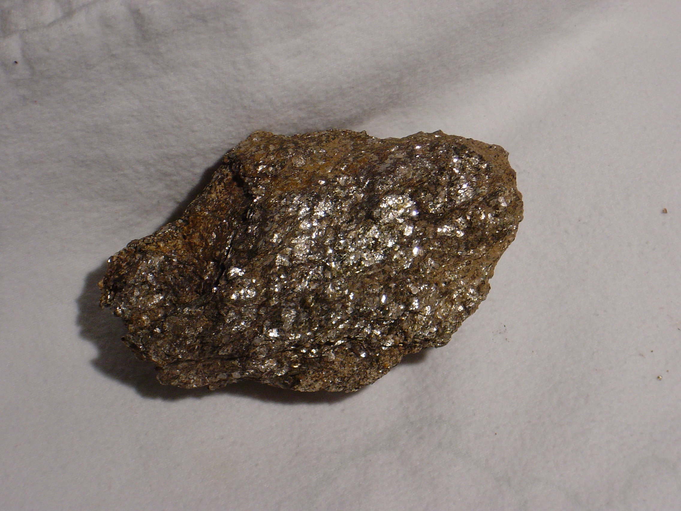 Muscovit-Biotit-Schiefer (Glimmerschiefer-Serie) bei Aschaffenburg